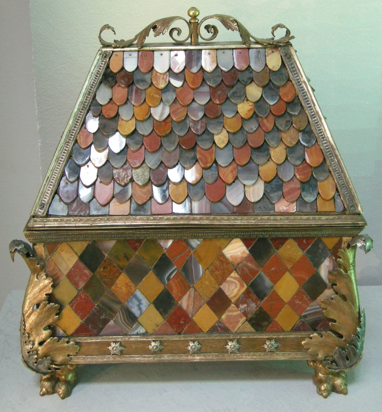 Scuola fiorentina, cofanetto reliquiario, fine xv sec., argento in parte dorato, sbalzato e fuso, con pietre dure